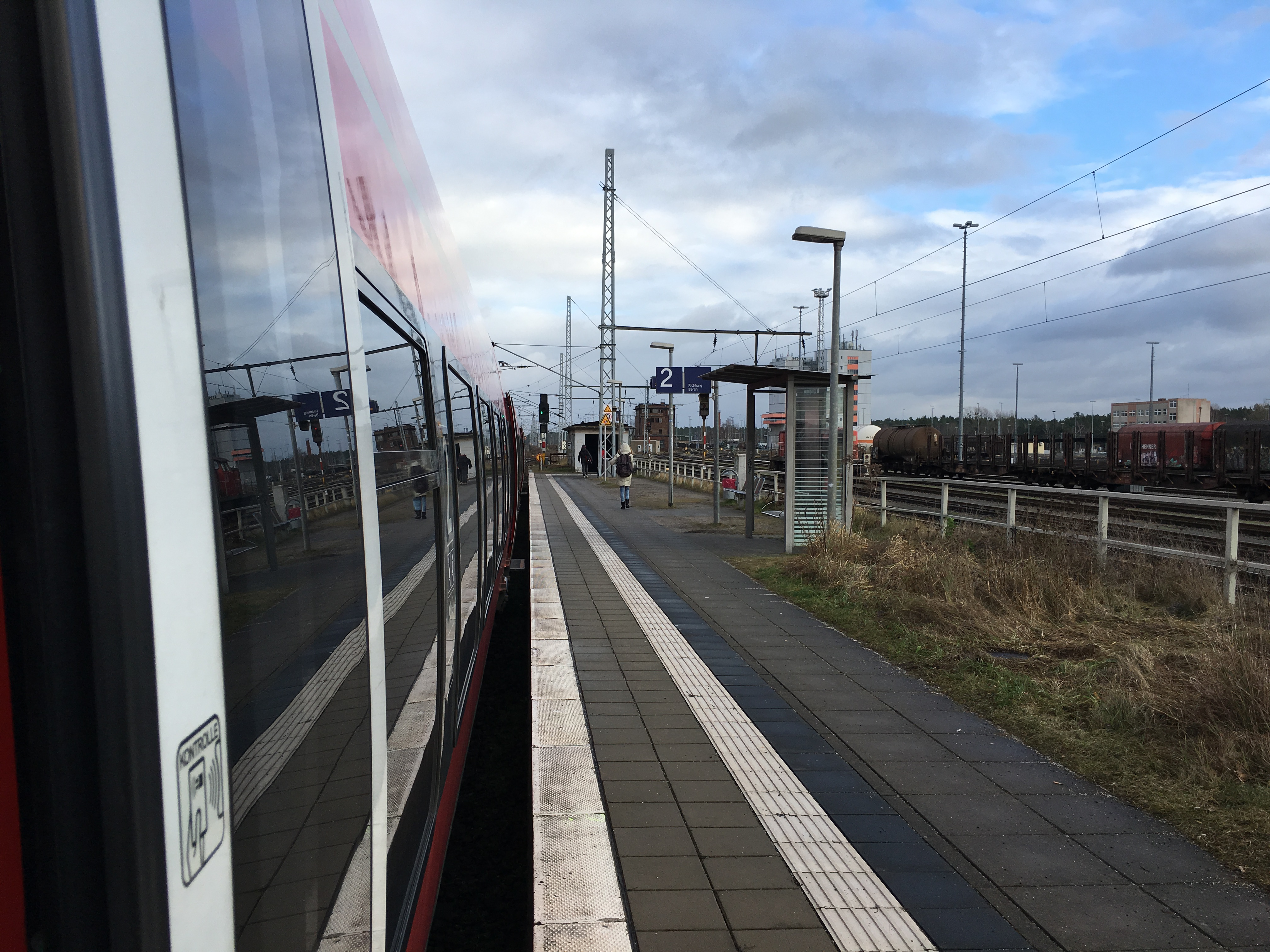 Bild vom Bahnsteig